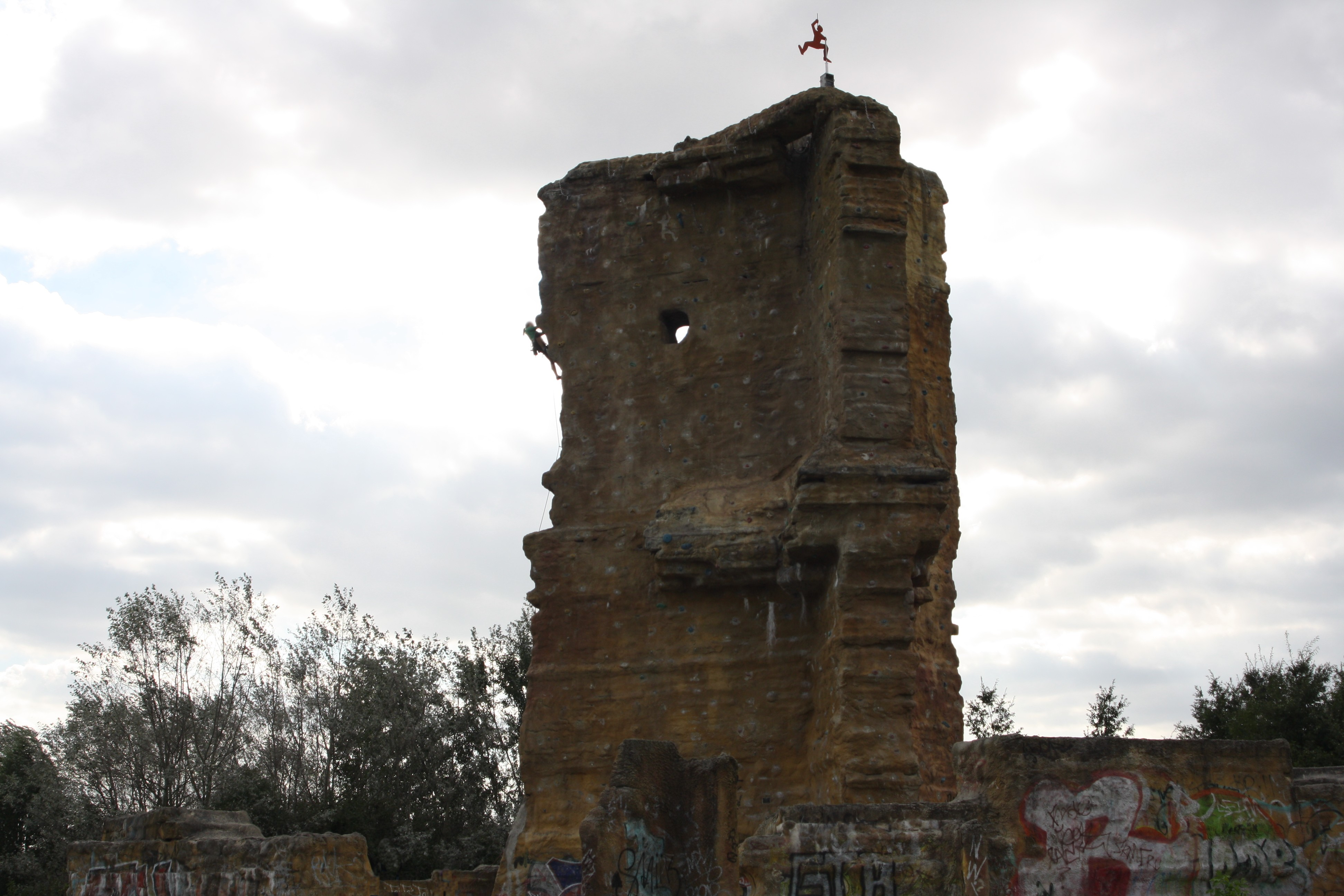 Kletterfelsen Ahrensfelde